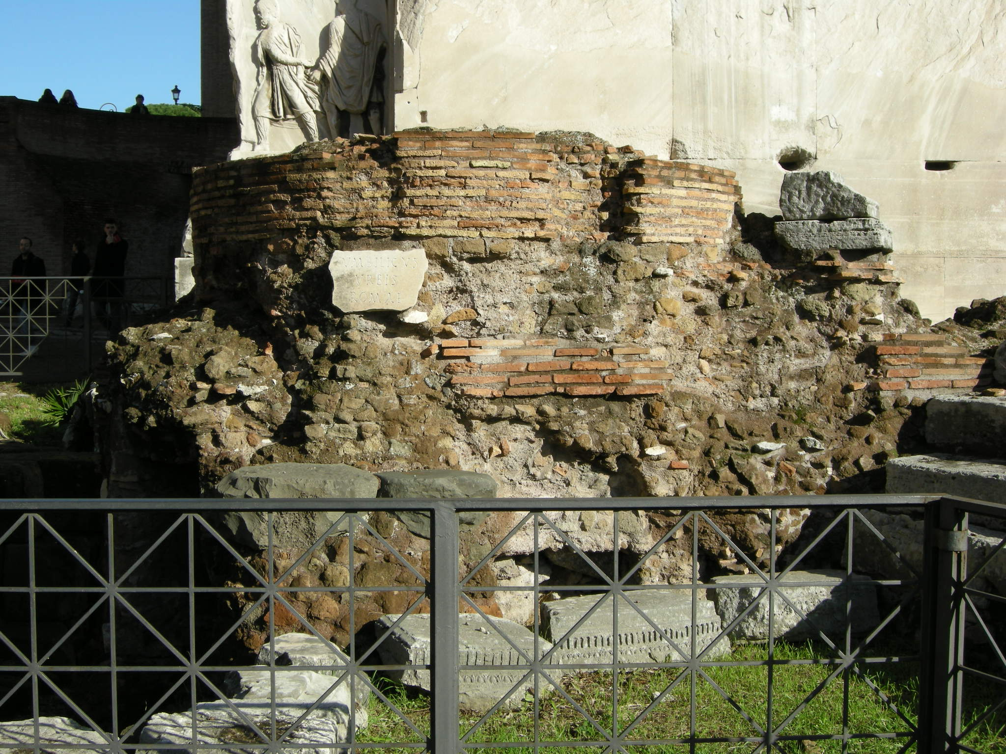 Umbiculus urbis 00